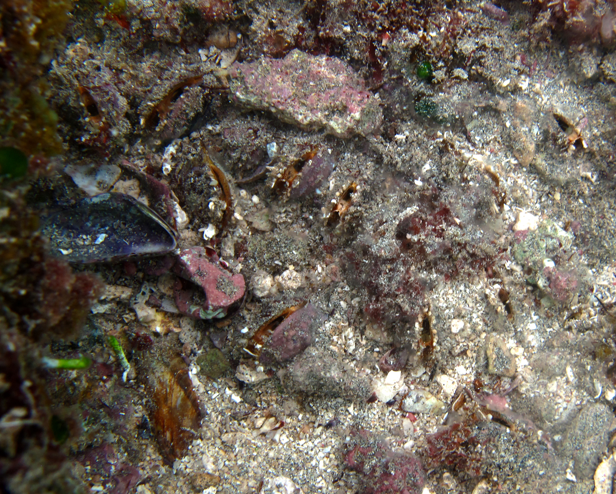 Colonie de Modiolus auriculatus à la Réunion.